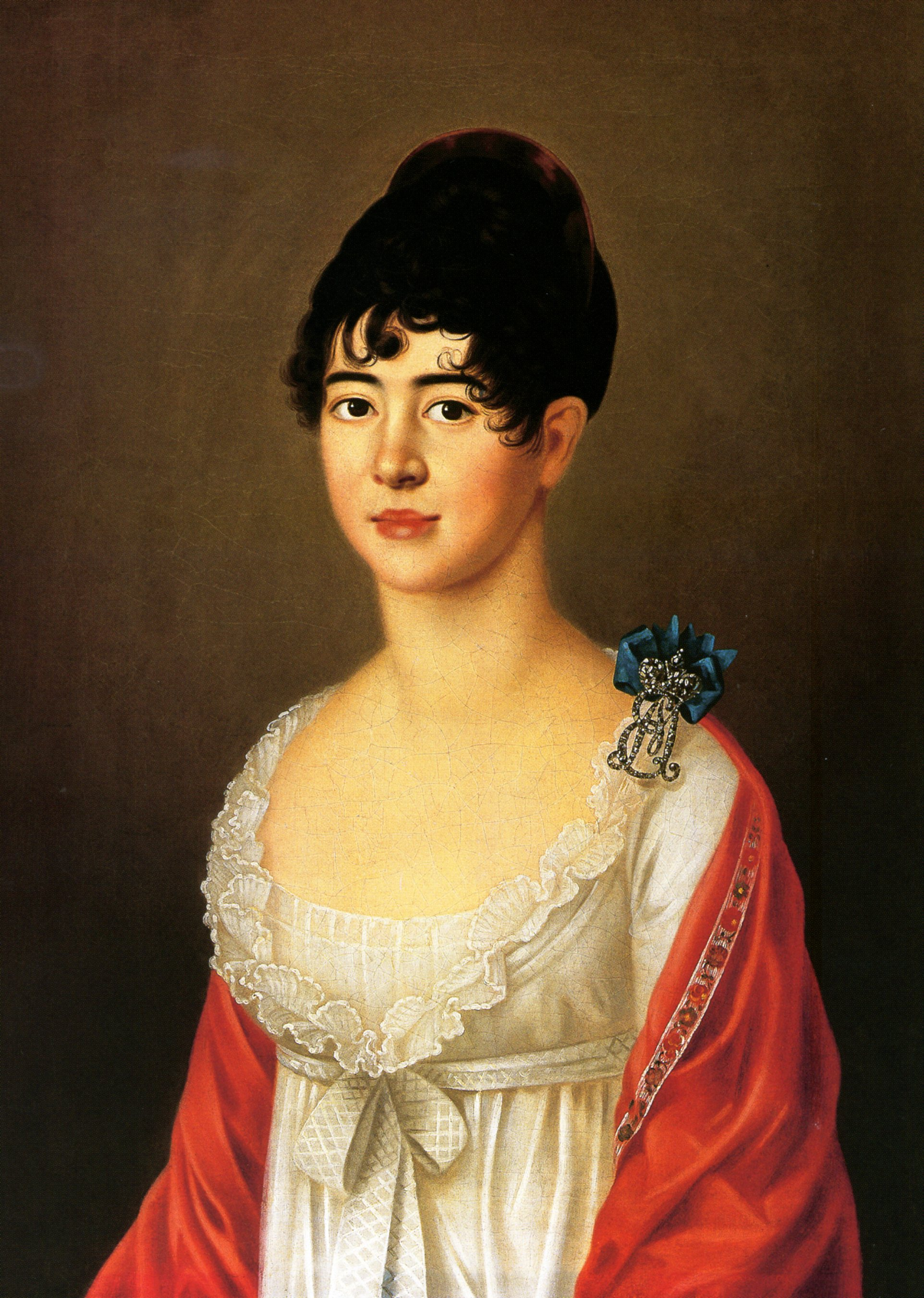 Екатерина Алексеевна Уварова, ур. Разумовская (1783-1849), была замужем за графом С.С.Уваровым